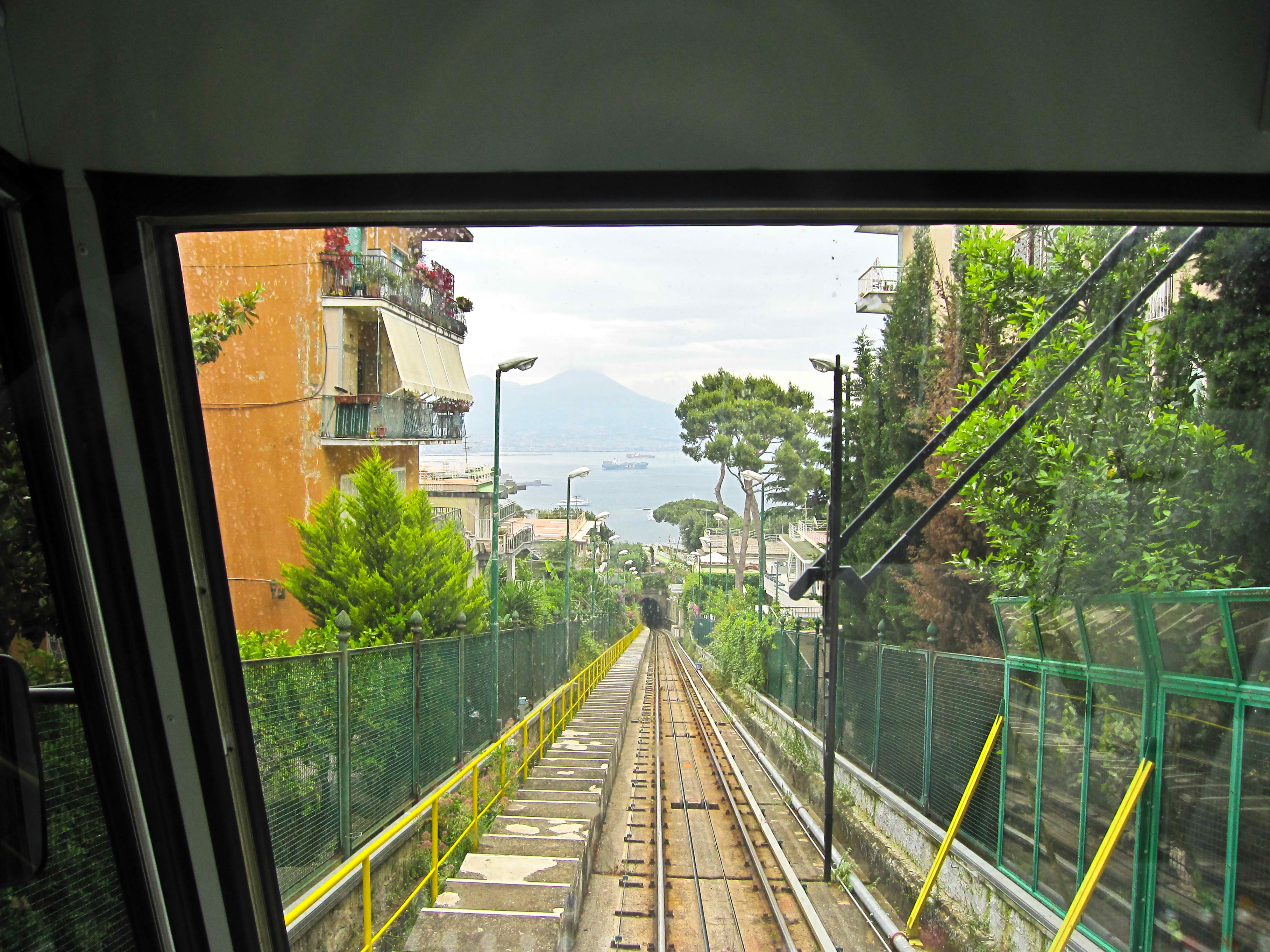 Vista di una parte del percorso attraverso i vetri della vettura.